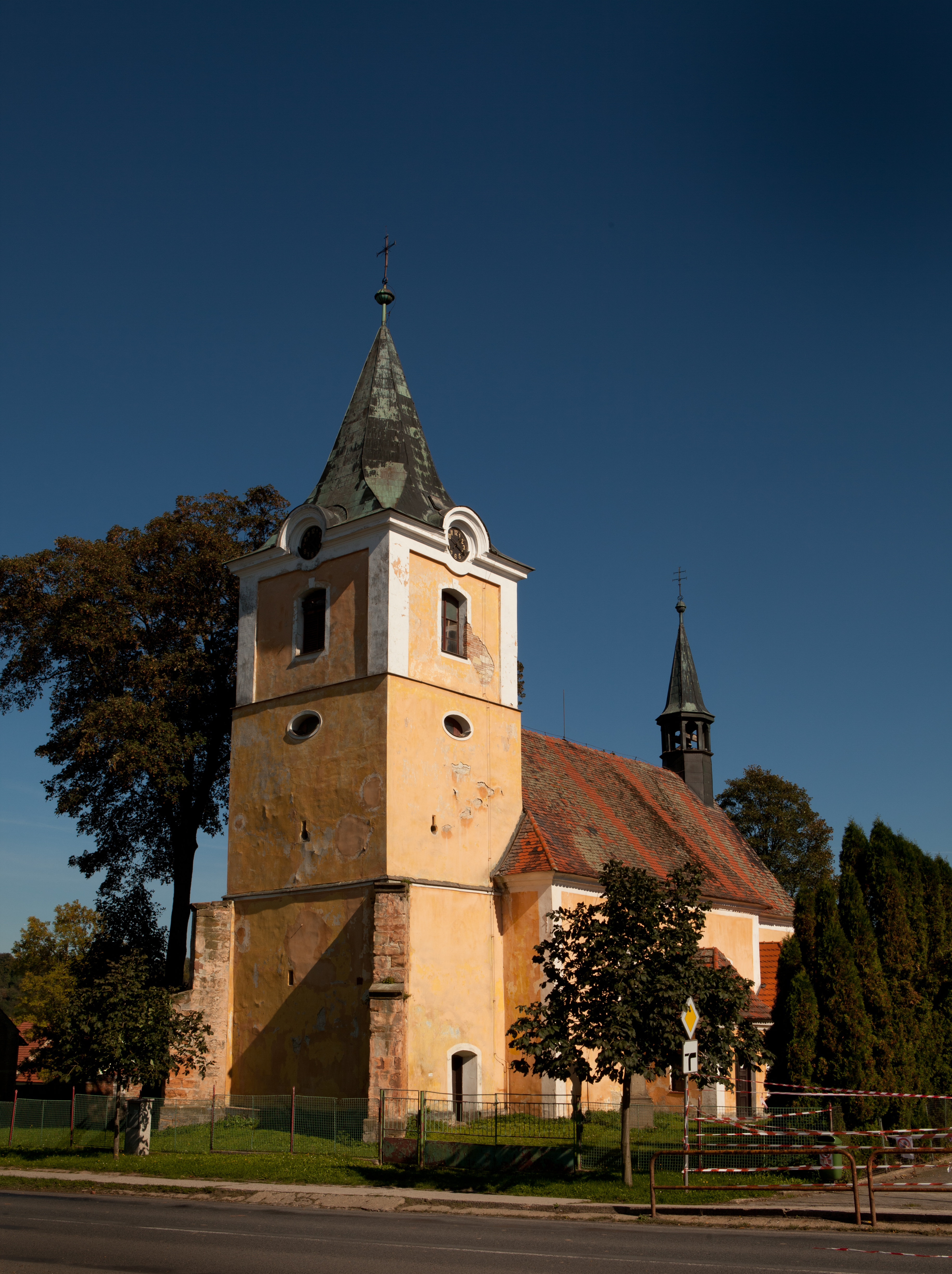 Kostel sv. Petra a Pavla (Řevničov), náves, Řevničov